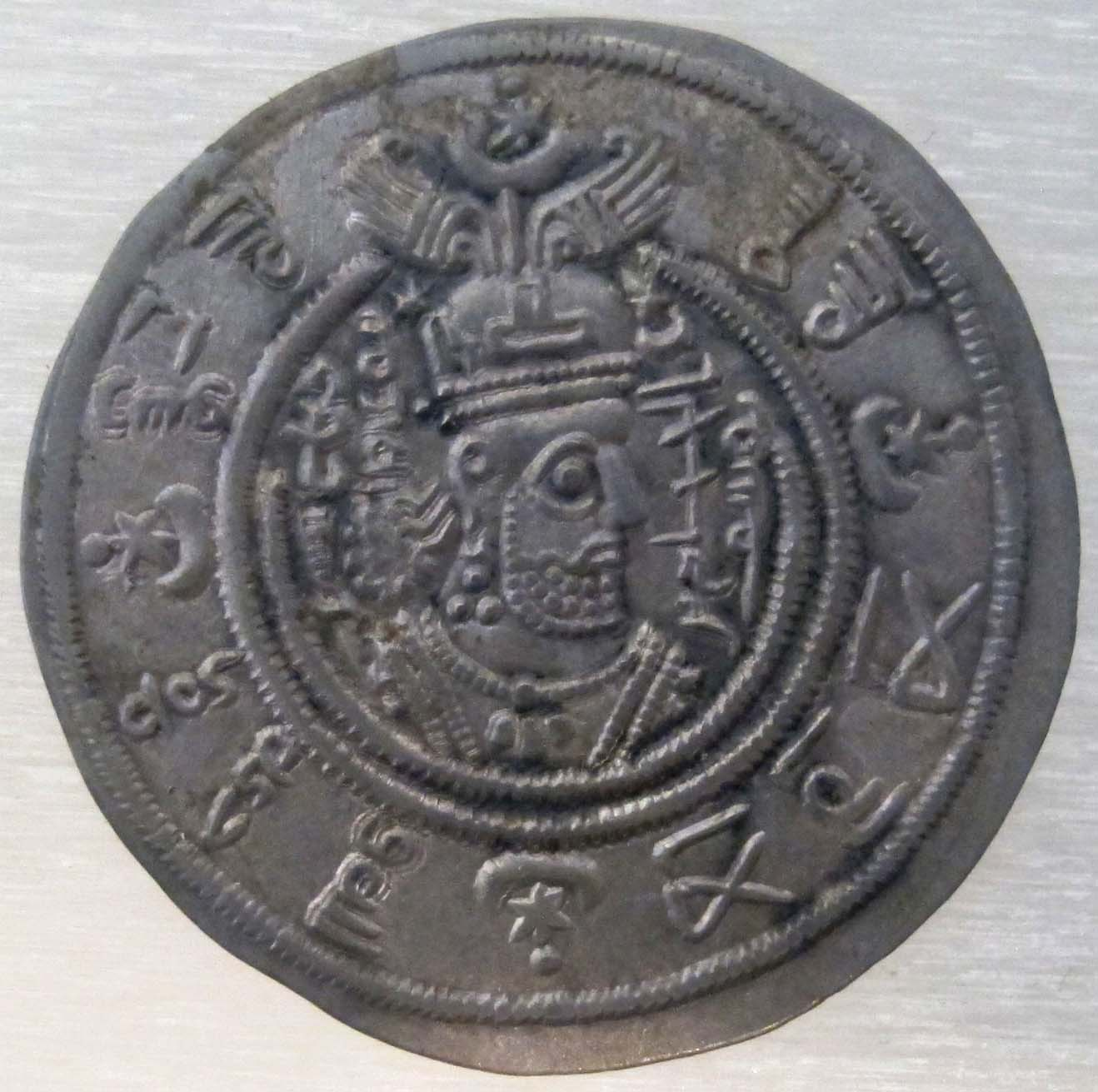 Siria, hajjaj bin yusuf, drahm arabo-sasanide, 695